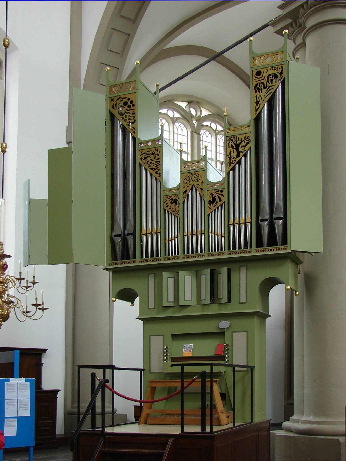 Choir organ (Flentrop, 1963), Westerkerk, Amsterdam